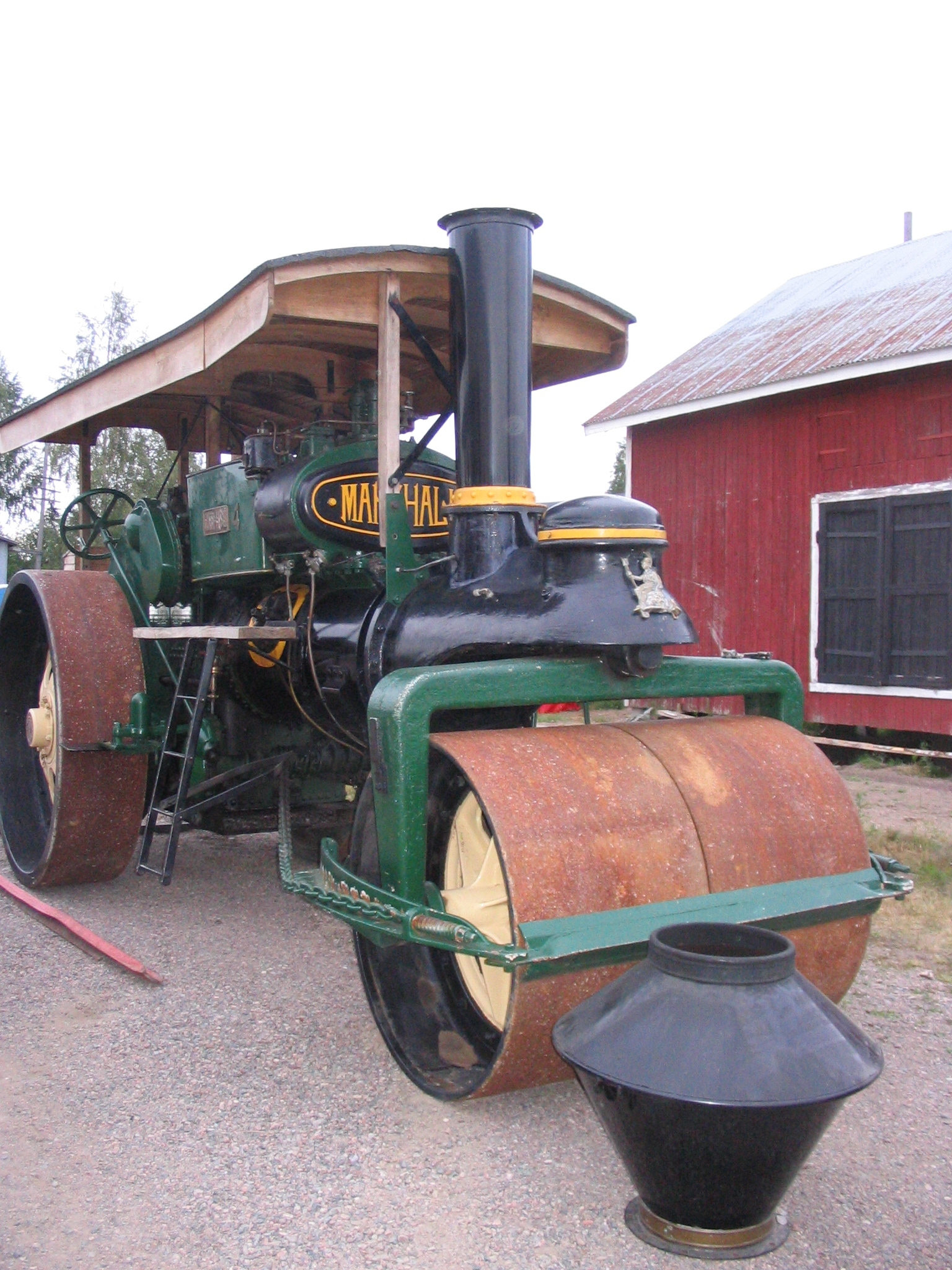 Description